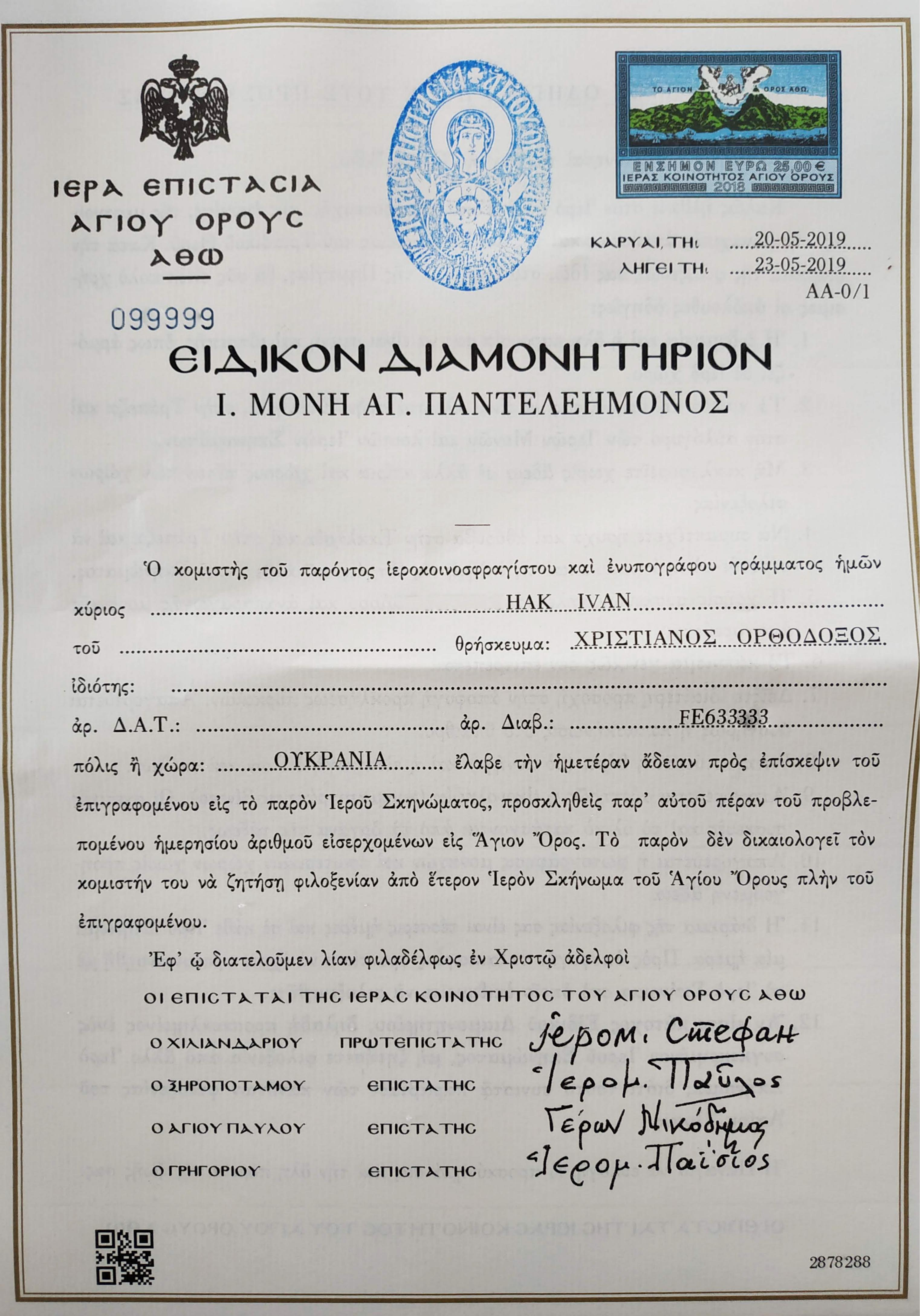 Διαμονητηριον 2019